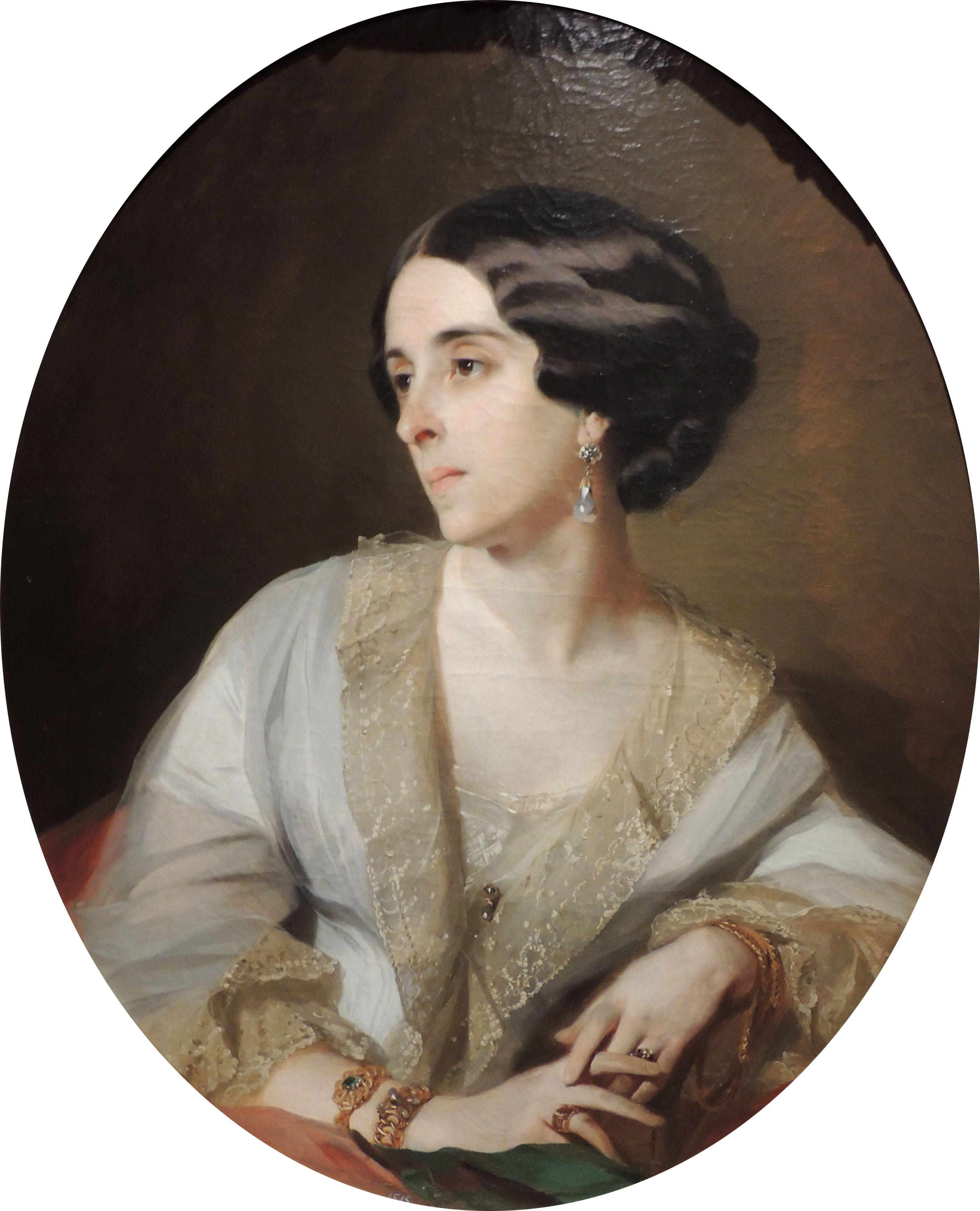 Иван Макаров. Портрет О.П. Стахович. 1860-е. Орловский областной музей изобразительных искусств. Иконографическое определение В.Ф. Василенко. ООМИИ. Ольга Павловна Стахович (1827-1902) дочь Павла Николаевича Ушакова (1779-1853) от брака с Софией Гавриловной Родзянко (1803-1877). С 1853 жена Александра Александровича Стаховича (1830-1913)